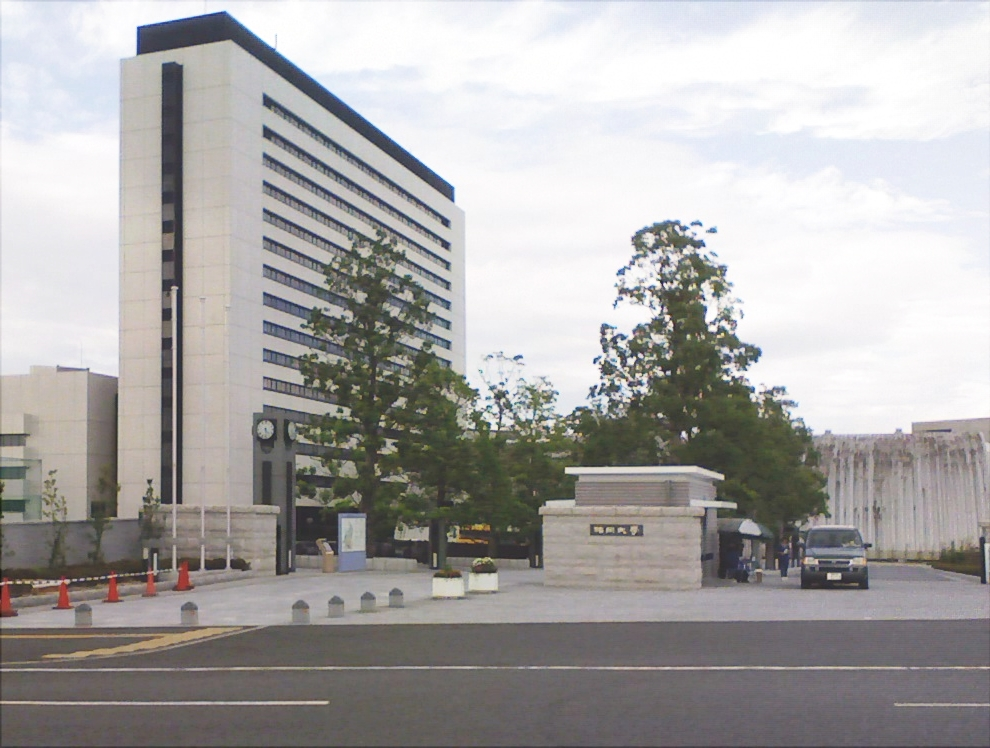 Fukuoka University a private university at Fukuoka Japan.